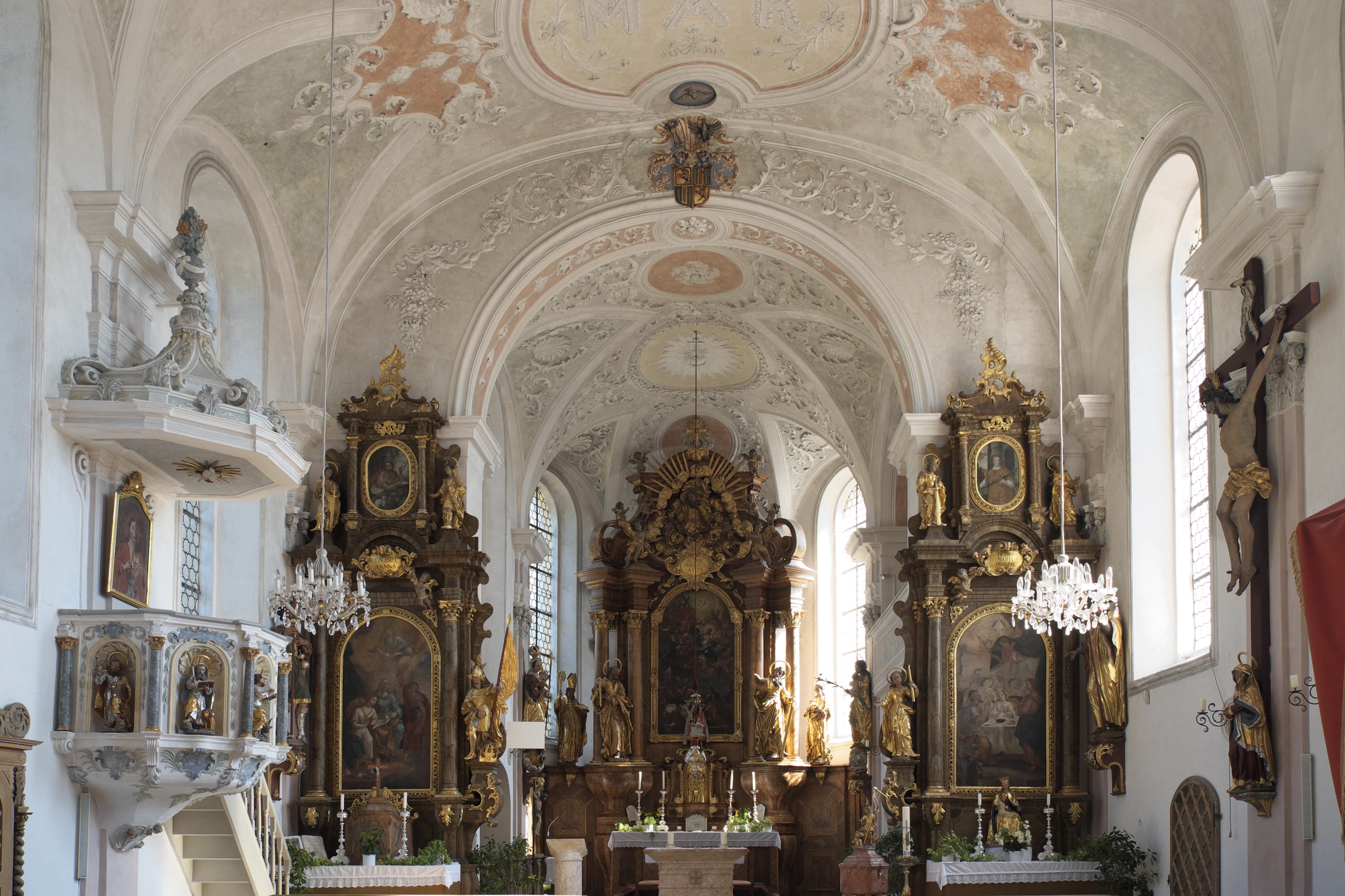 Katholische Pfarrkirche Mariä Himmelfahrt in Epfenhausen (Penzing) im Landkreis Landsberg am Lech (Bayern/Deutschland)